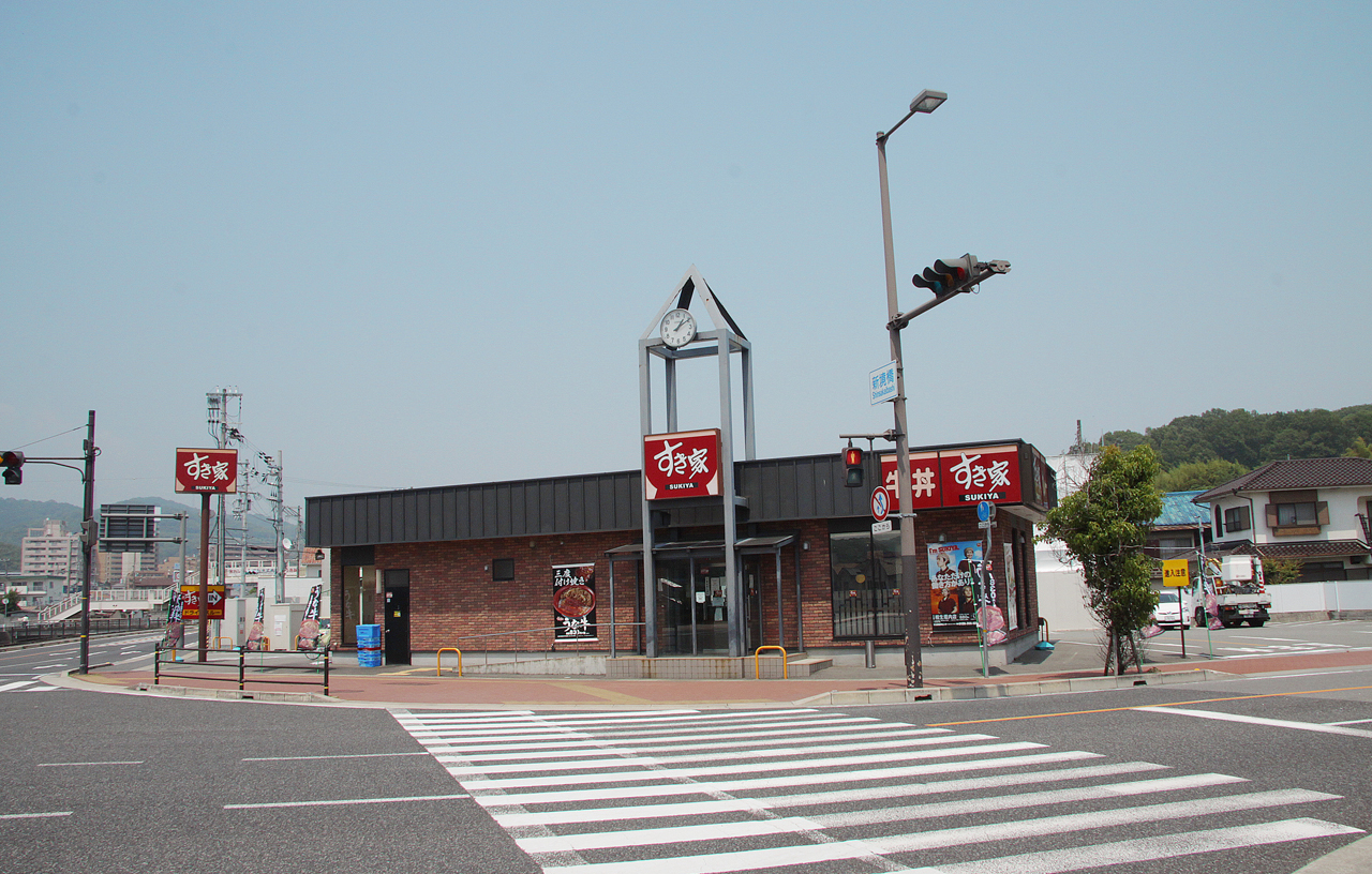 店舗例（兵庫県 相生垣内店） 兵庫県南西部にある店舗など。 すき家すき家 相生垣内店。 撮影：2014年5月31日